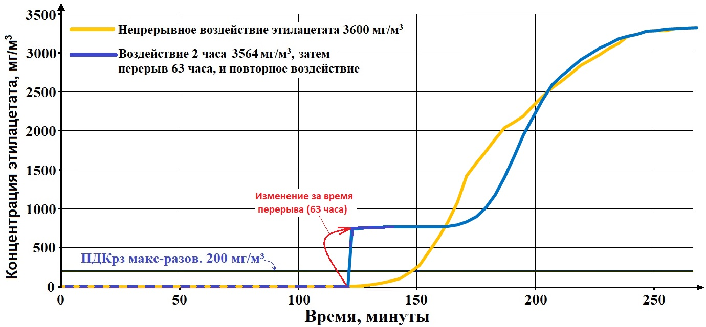 Изменение концентрации этилацетата в очищенном воздухе при непрерывном использовании противогазного фильтра, и при его использовании с перерывами